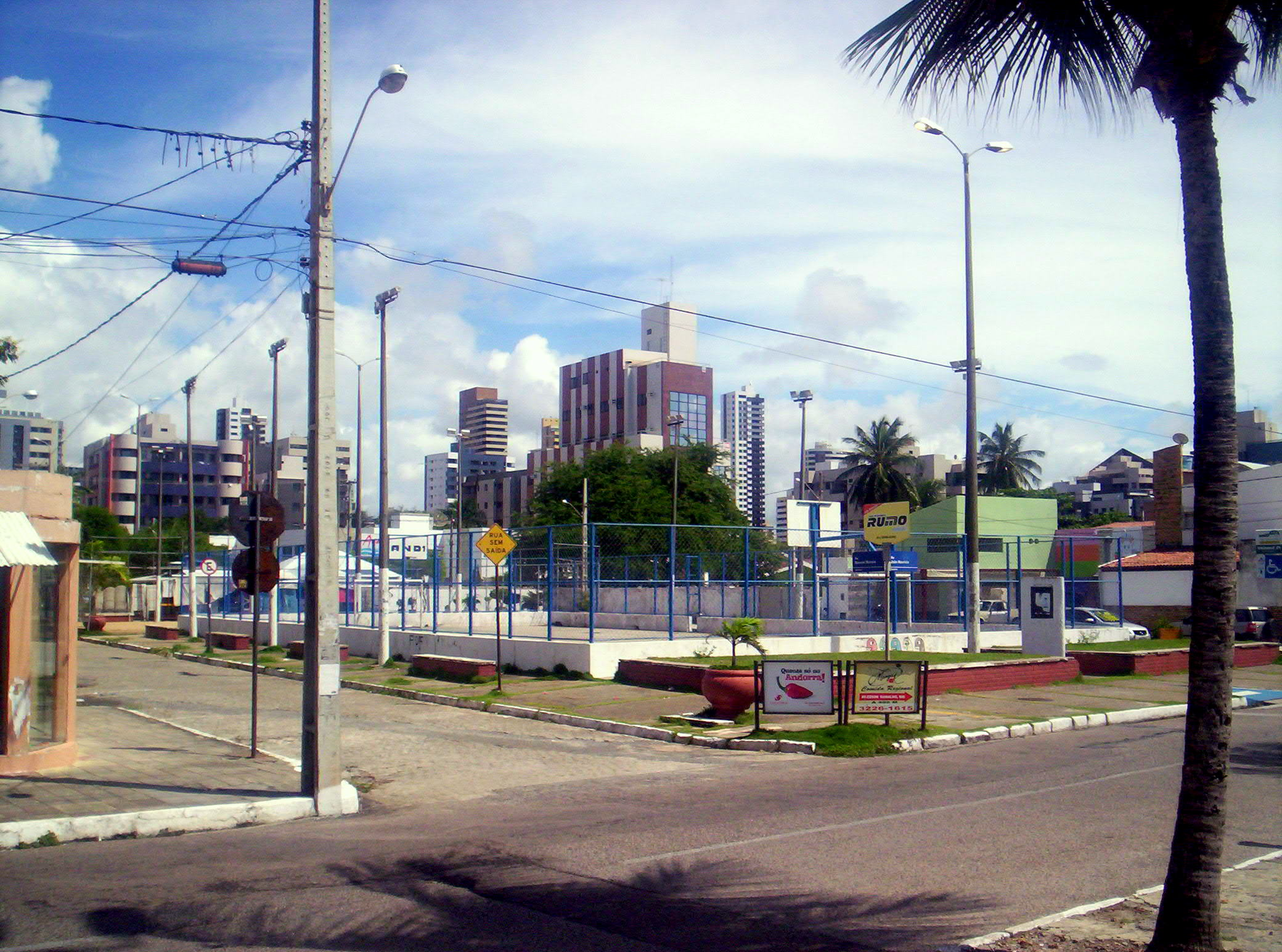 Fotos Corriqueiras